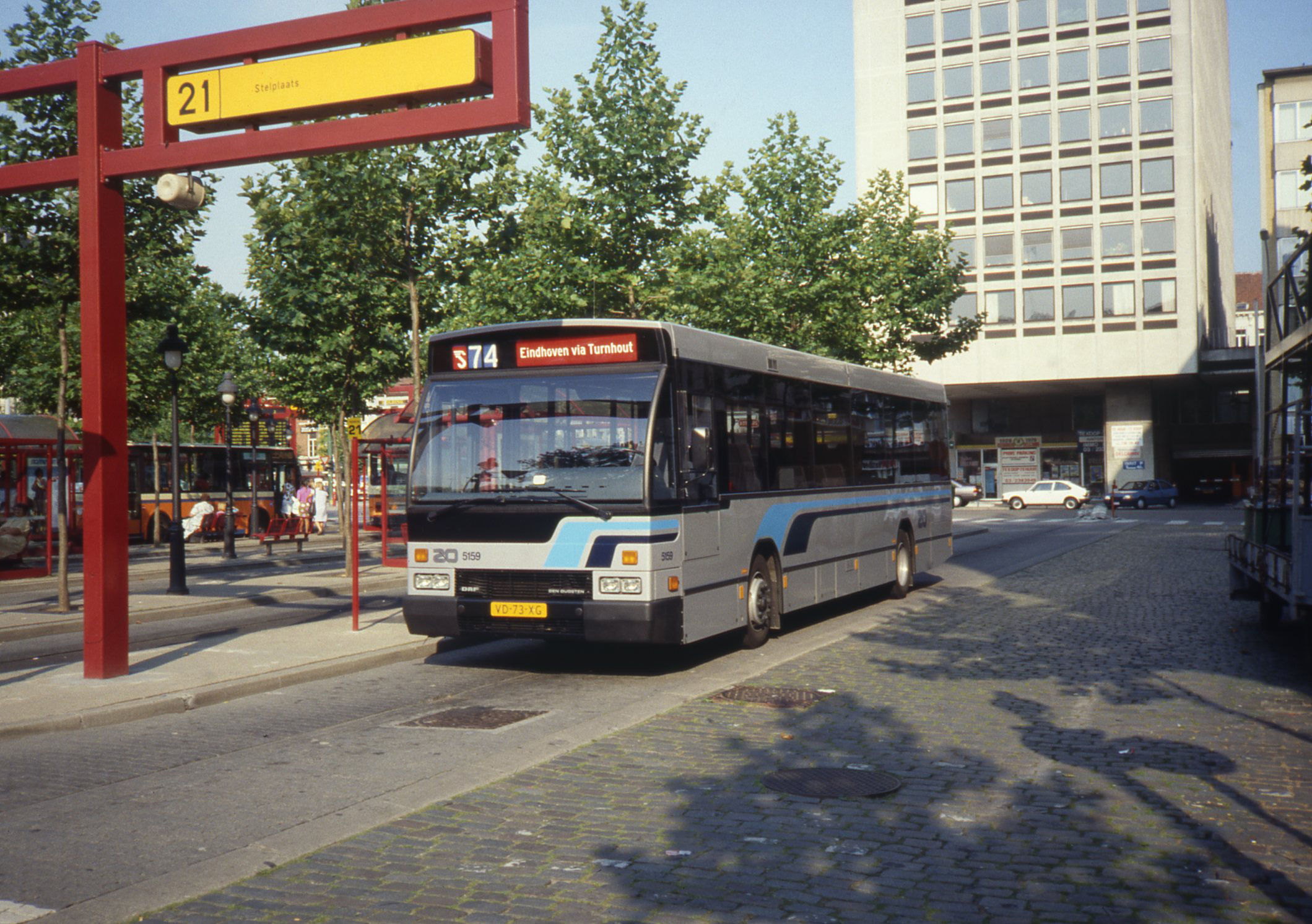 Nederlandse snelbusdienst 74 van de Zuidooster in Antwerpen. zie: [1]